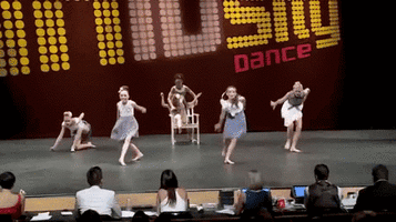 Dance Moms grupo elite junior temporada 4 episodio 27